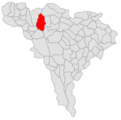 Categorie:Hărţi ale judeţului Alba